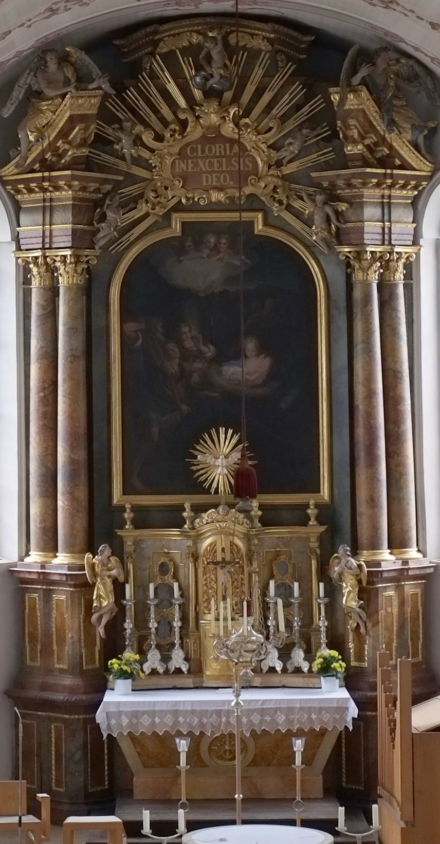 Detailansicht Hochaltar